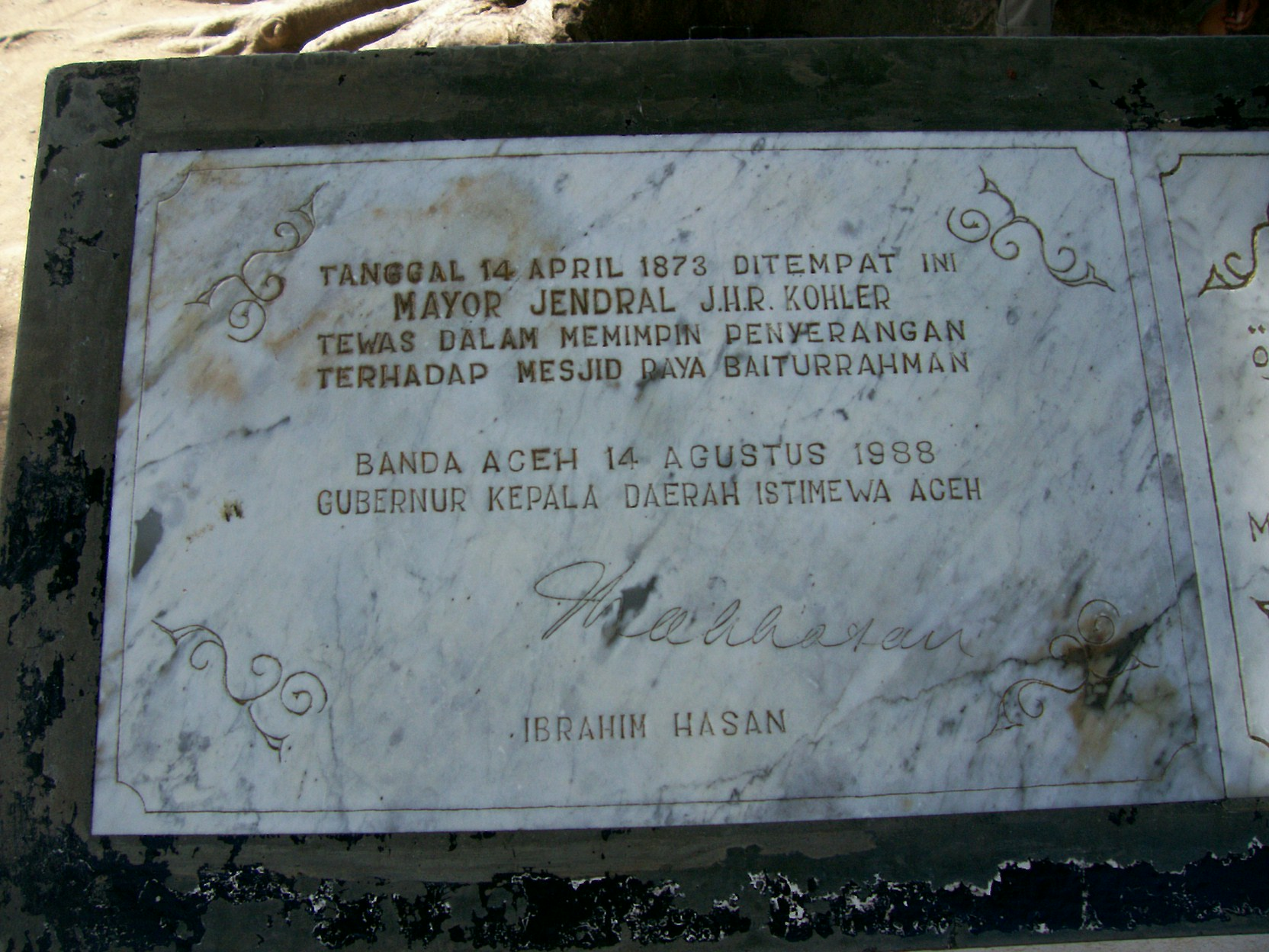 Prasasti tewasnya Jenderal J.H.R. Kohler di bawah pohon Kelumpang di depan Mesjid Raya Baiturrahman Banda Aceh